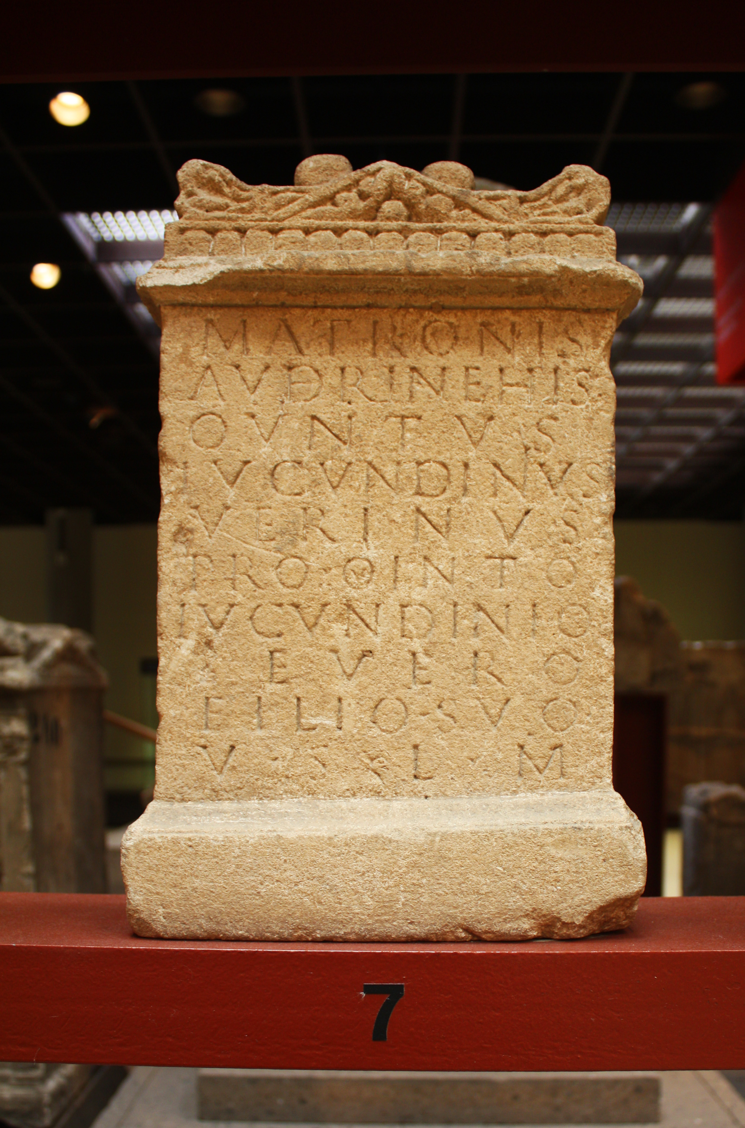 Römisch Germanisches Museum in Köln: Den Audrinischen Matronen geweihter Stein des 2/3. Jahrhunderts. Fundort Köln-Hermülheim, Luxemburger Straße, ehemaliger Bahnhof (Finke 00280 = RSK 00087 = IKoeln 00123 = AE 1928, 20). Die Abkürzung am Ende steht für Votum Solvit Libens Merito, eine gebräuchliche Floskel auf Weihesteinen: „Das Gelübde hat [er oder sie] gern nach Verdienst erfüllt.“ Inschrift: Matronis Audrinehis Quintus Iucundinius Verinus pro Quinto Iucundinio Severo filio suo v(otum) s(olvit) l(ibens) m(erito) Übersetzung: „Den Audrinehischen Matronen hat Quintus Jucundinius Verinus für Q.J.Severus, seinen Sohn, [diesen Stein gesetzt] ...“